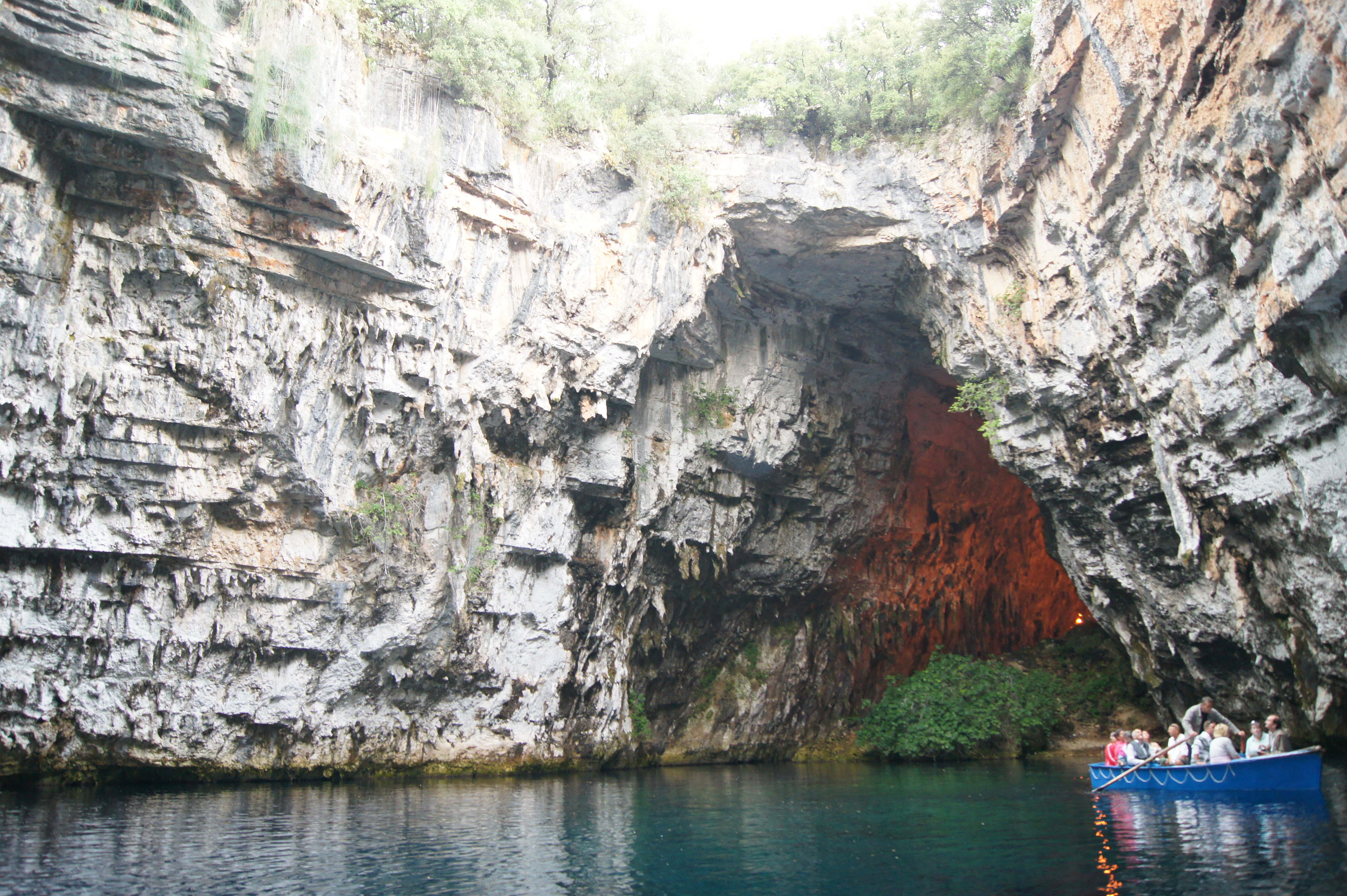 Lac souterrain à ciel ouvert de Mélissani, près de la ville de Sami (île de Céphalonie, Grèce).